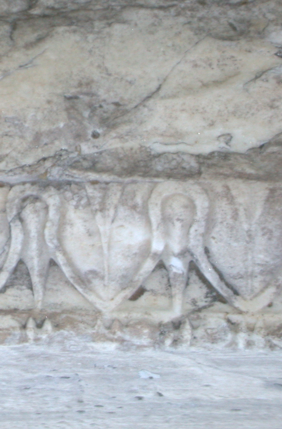 Atene, Acropoli, frammento di blocco con modanatura decorata proveniente dall'Eretteo, in marmo pentelico.